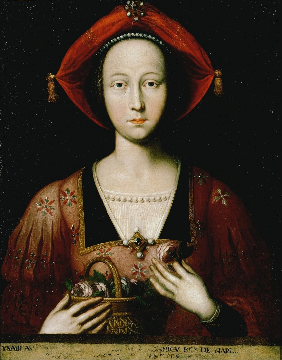 Isabella di Lorena (1400-1453), moglie di Renato d'Angiò, re di Napoli.